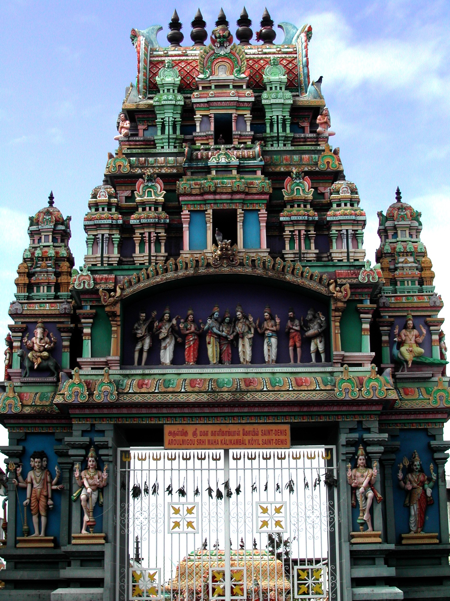 Photo du temple tamoul de Saint-Denis de la Réunion.